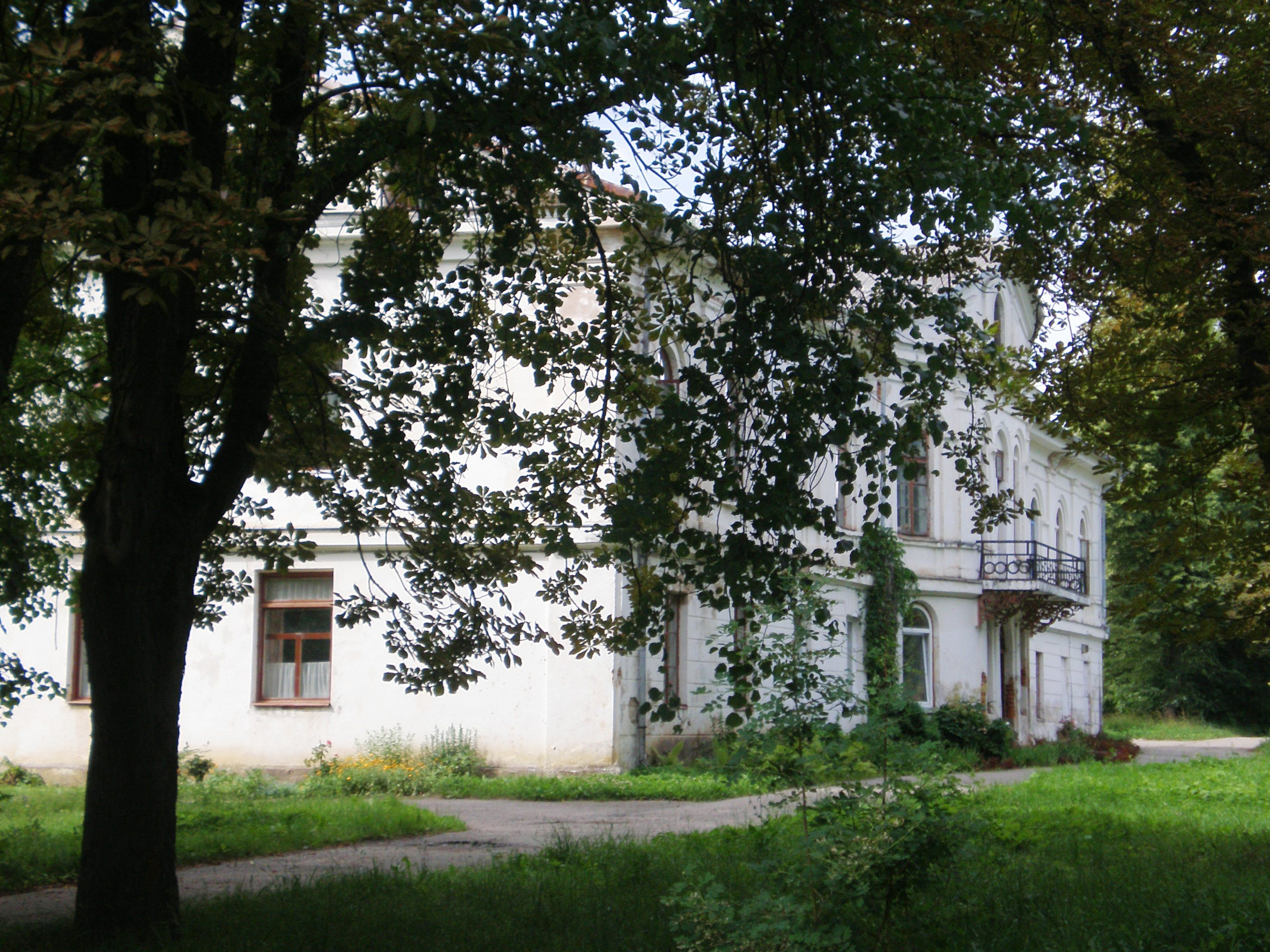 Šlapaberžės dvaras, Kėdainių raj.